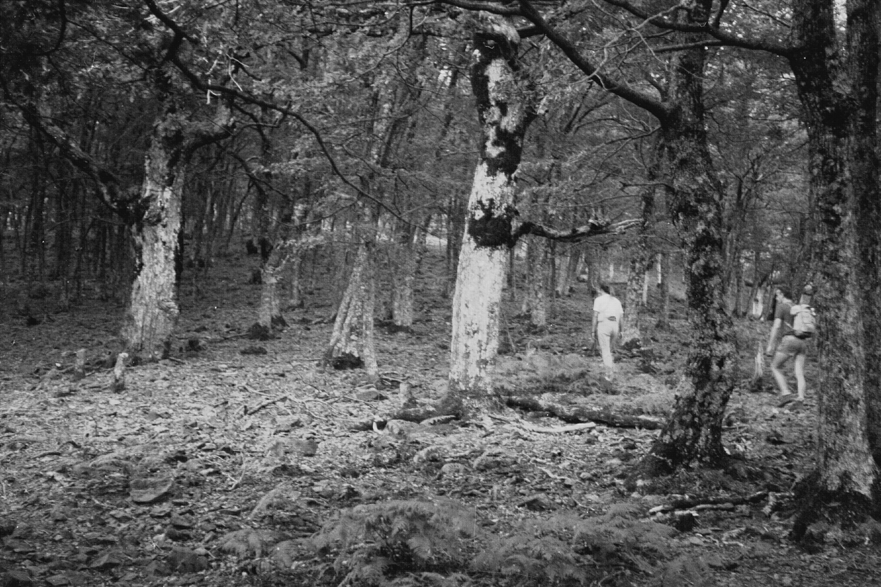 Flaumeichenwald (Quercus pubescens) im Norden von Samothrake